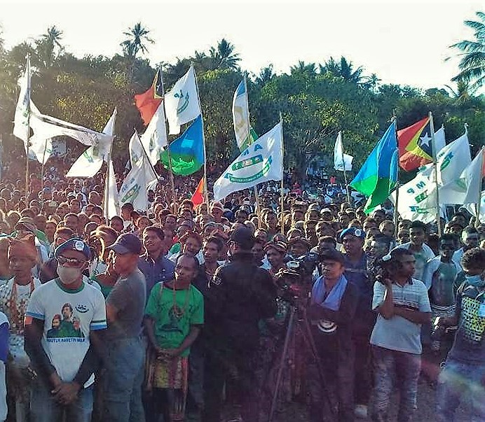 Wahlkampfveranstaltung der AMP in Oesilo, Oecusse, Osttimor